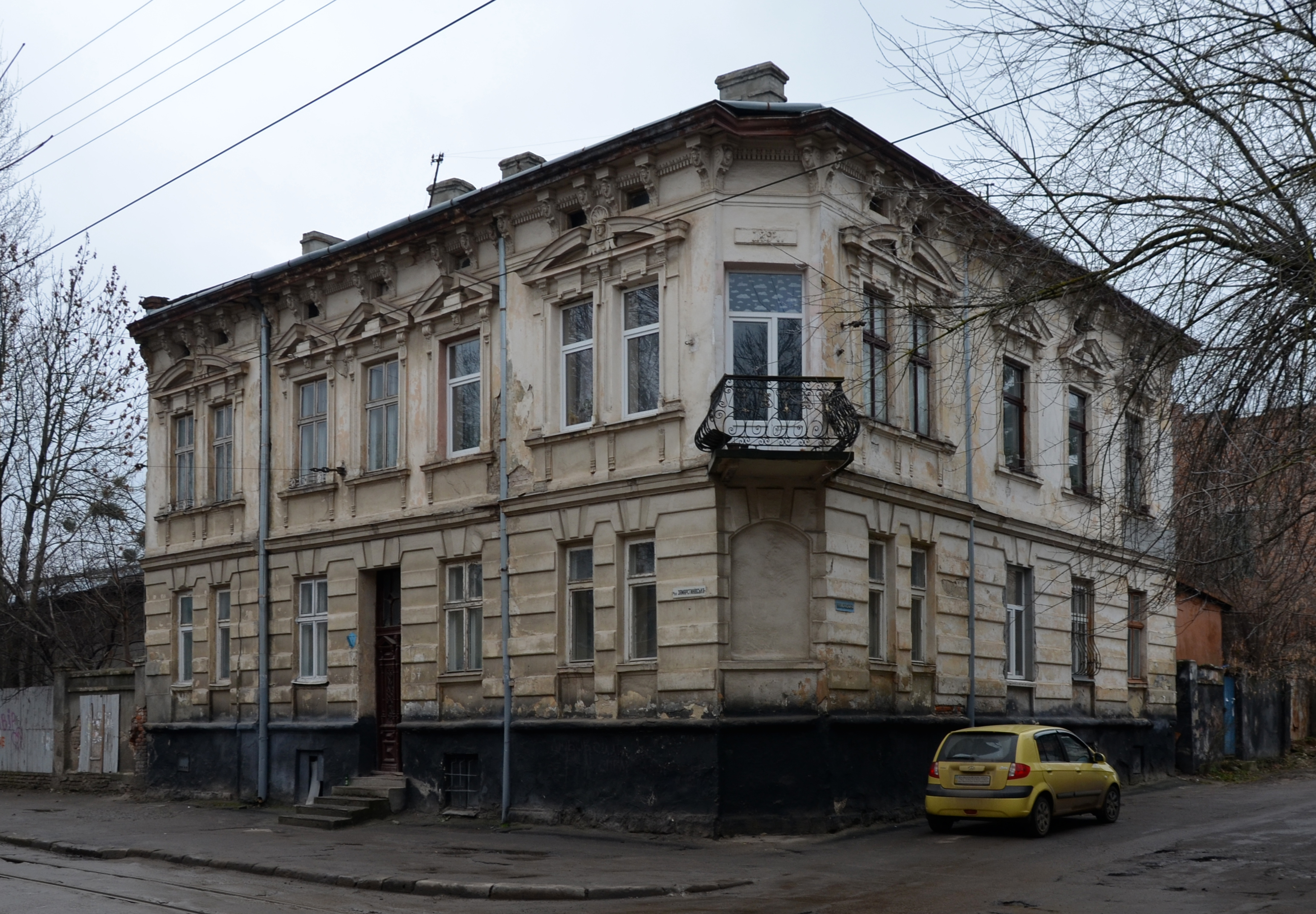 Будинок № 68 на вулиці Замарстинівській у Львові.